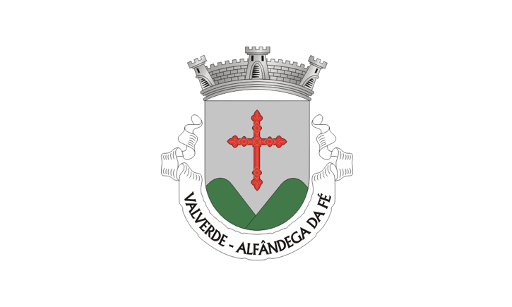 Bandera de la freguesia de Valverde